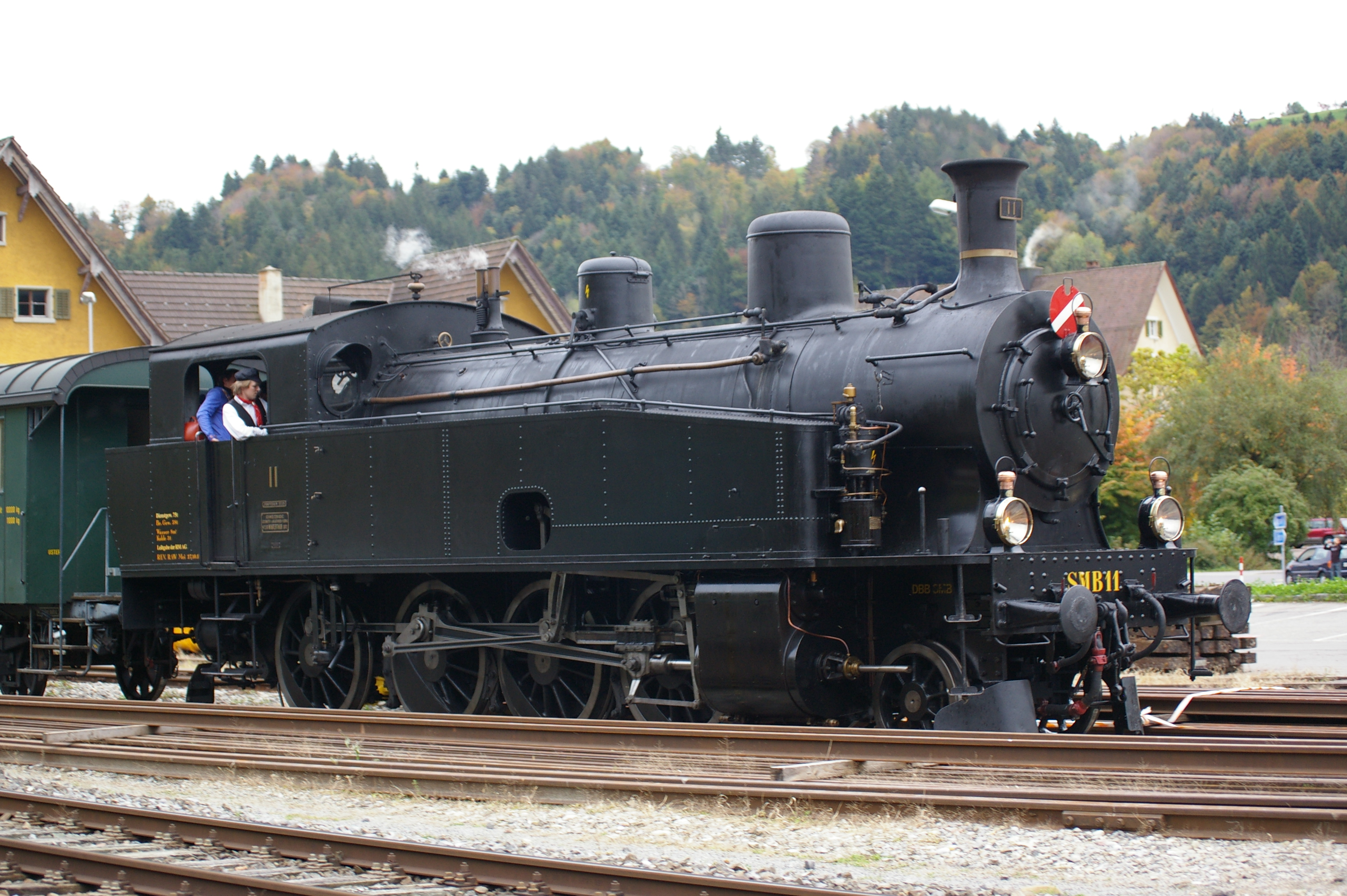 Dampflokomotive Ec 4/5 Nr. 11 des Vereins Dampfbahn Bern, gebaut 1911 in der Schweizerischen Lokomotiv- und Maschinen-Fabrik zu Winterthur für die Solothurn-Münster-Bahn, bei der Einfahrt von Osten in den Bahnhof von Bauma.